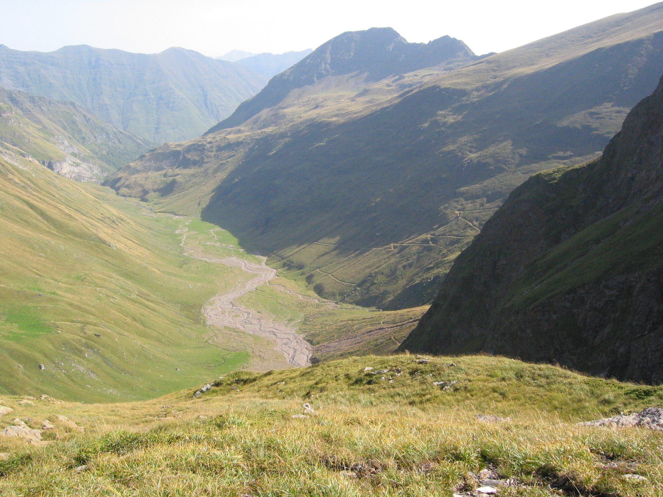 Depuis l'escarpement dit "le Pichous de Barroude", vue vers l'aval sur le grand replat de la vallée de La Gela, au pied des grands pâturages couvrant les flancs de la vallée, avec au fond le Pic de Bourgade.